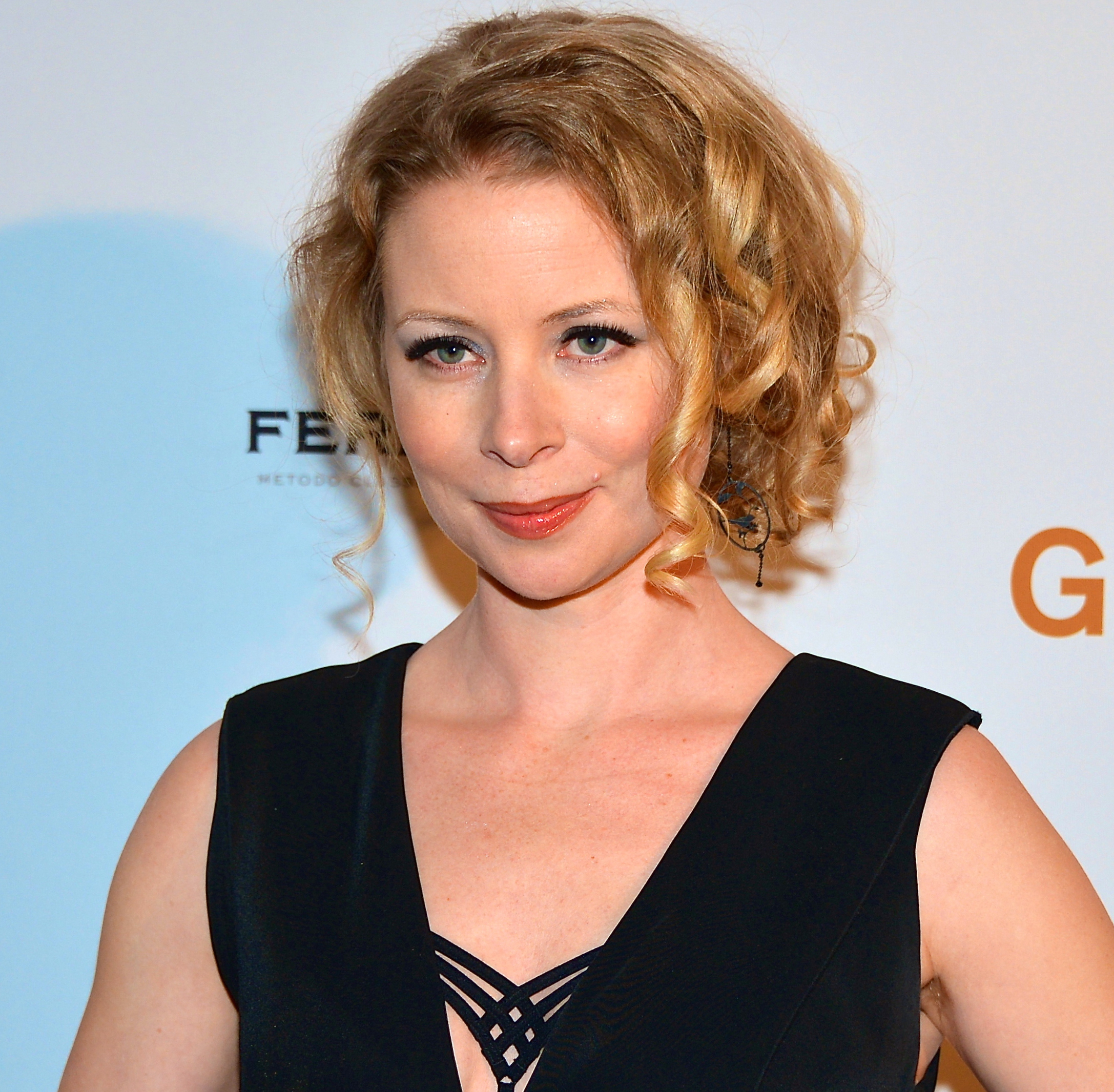 Julia Dufvenius på på Guldbaggegalan 2013 den 21 januari 2013.